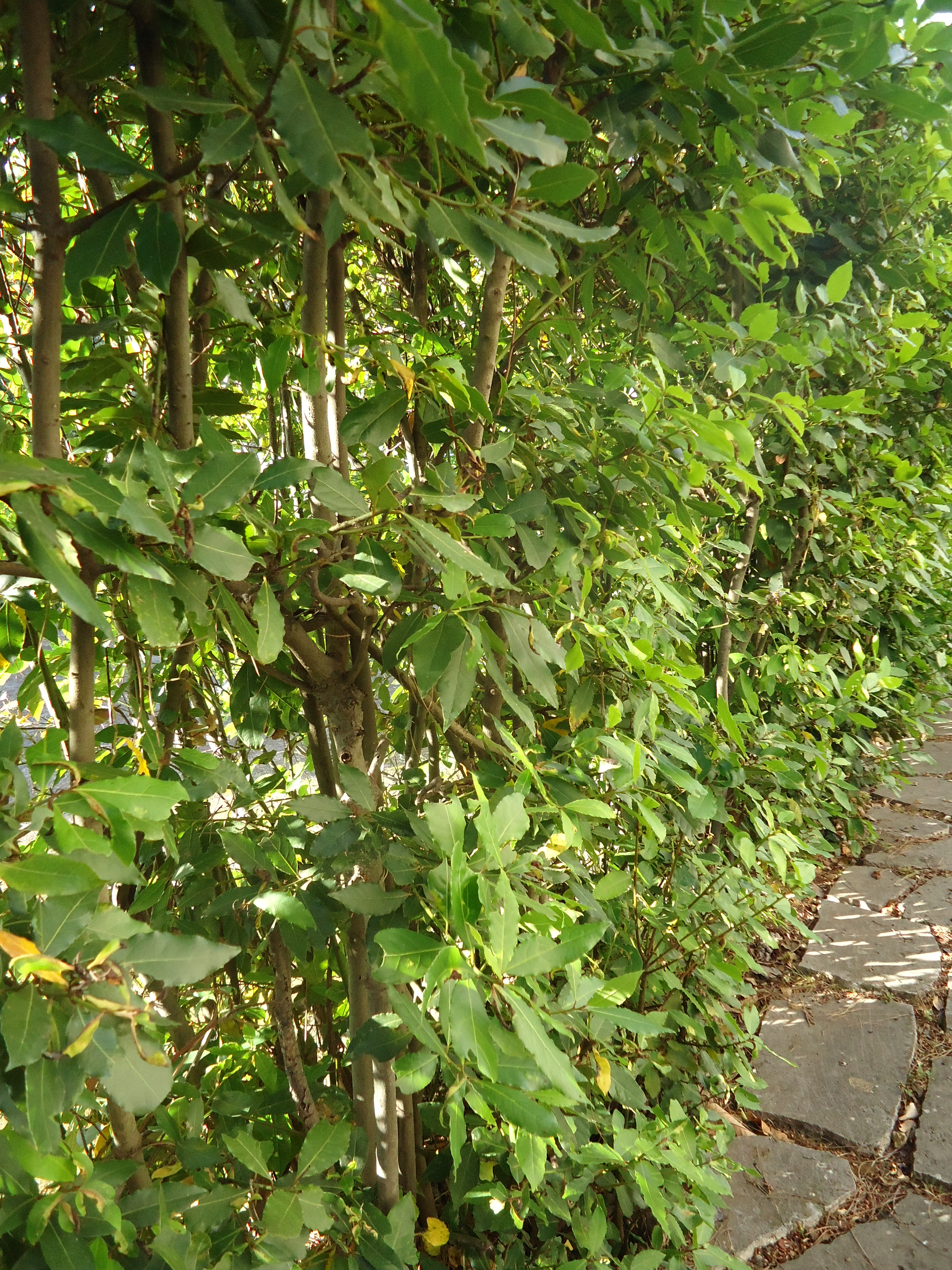 Laurus nobilis lungo un viale pavimentato ad opera incerta di travertino